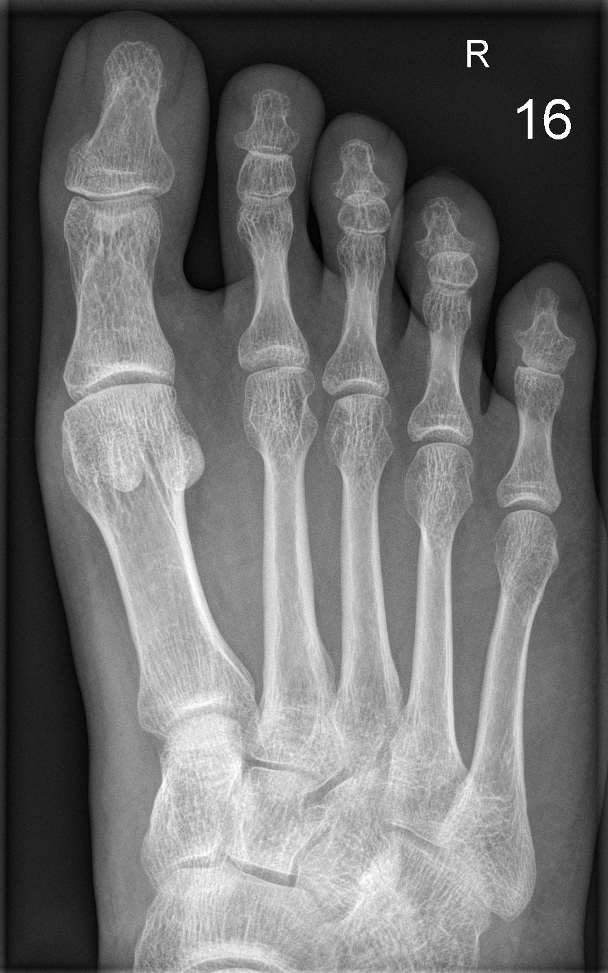 Röntgenbild rechter Fuß